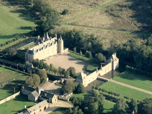 Photographie aérienne du château de Bienassis prise le 23 octobre 2005